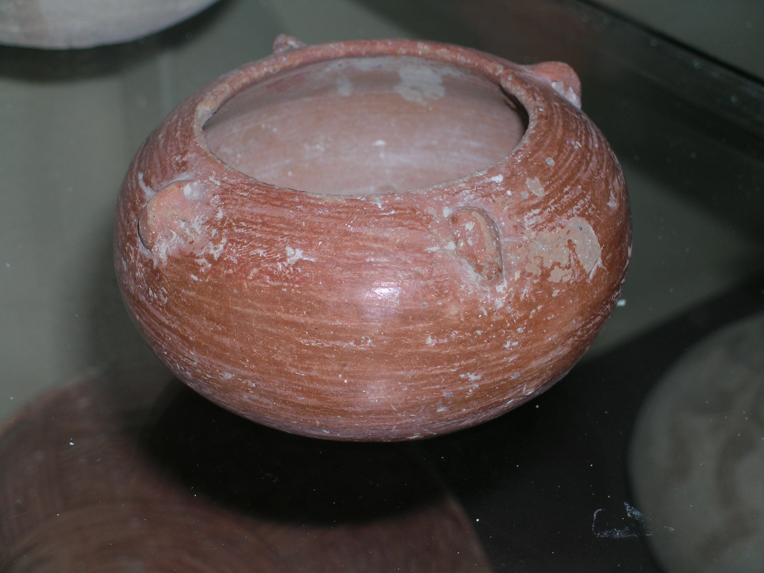 vaso in stile Red burnished ware proveniente dalla Palestina, attualmente al museo di Tel Aviv